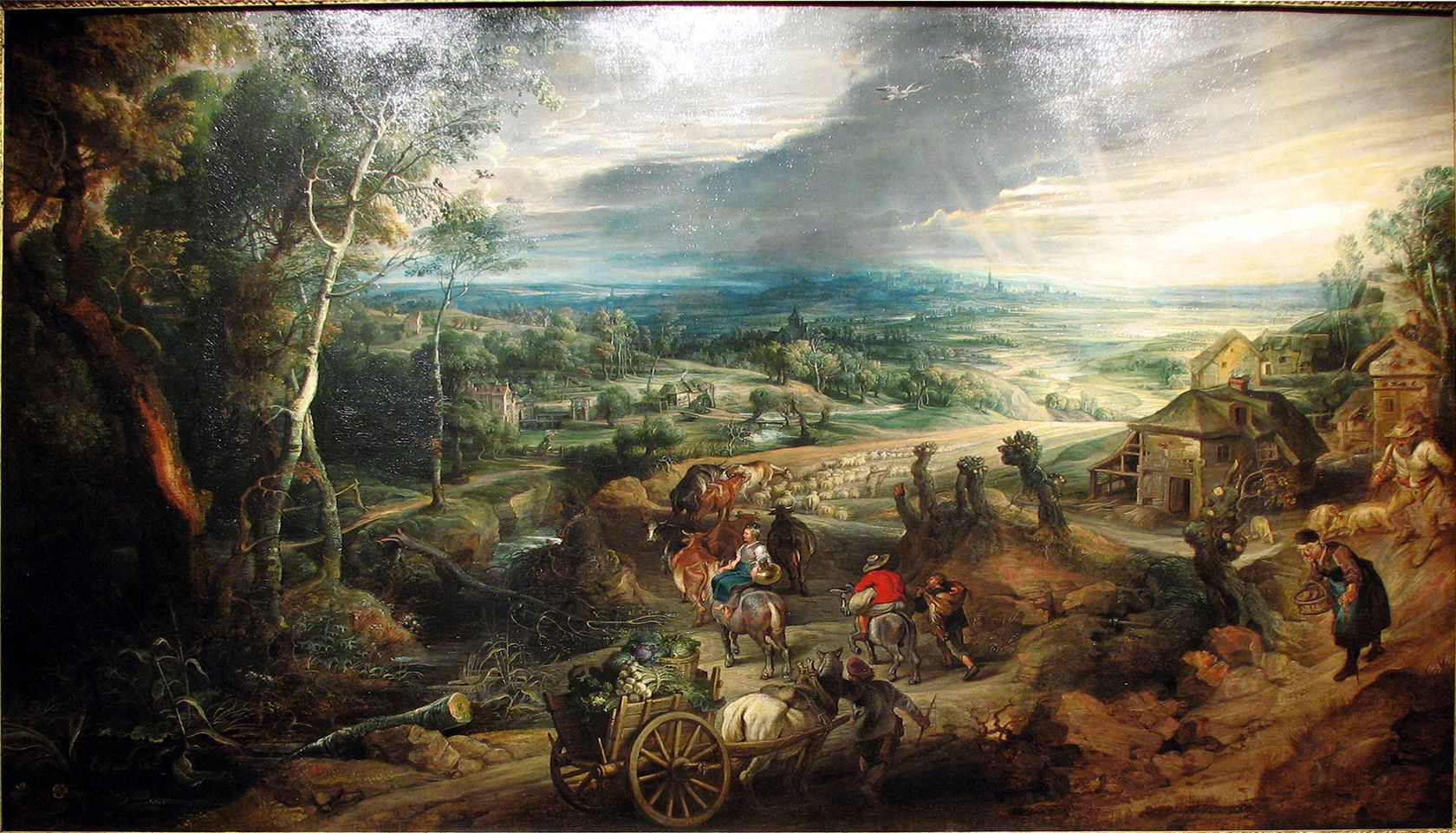 Chłopi zmierzający na targ Summer, Royal Collection